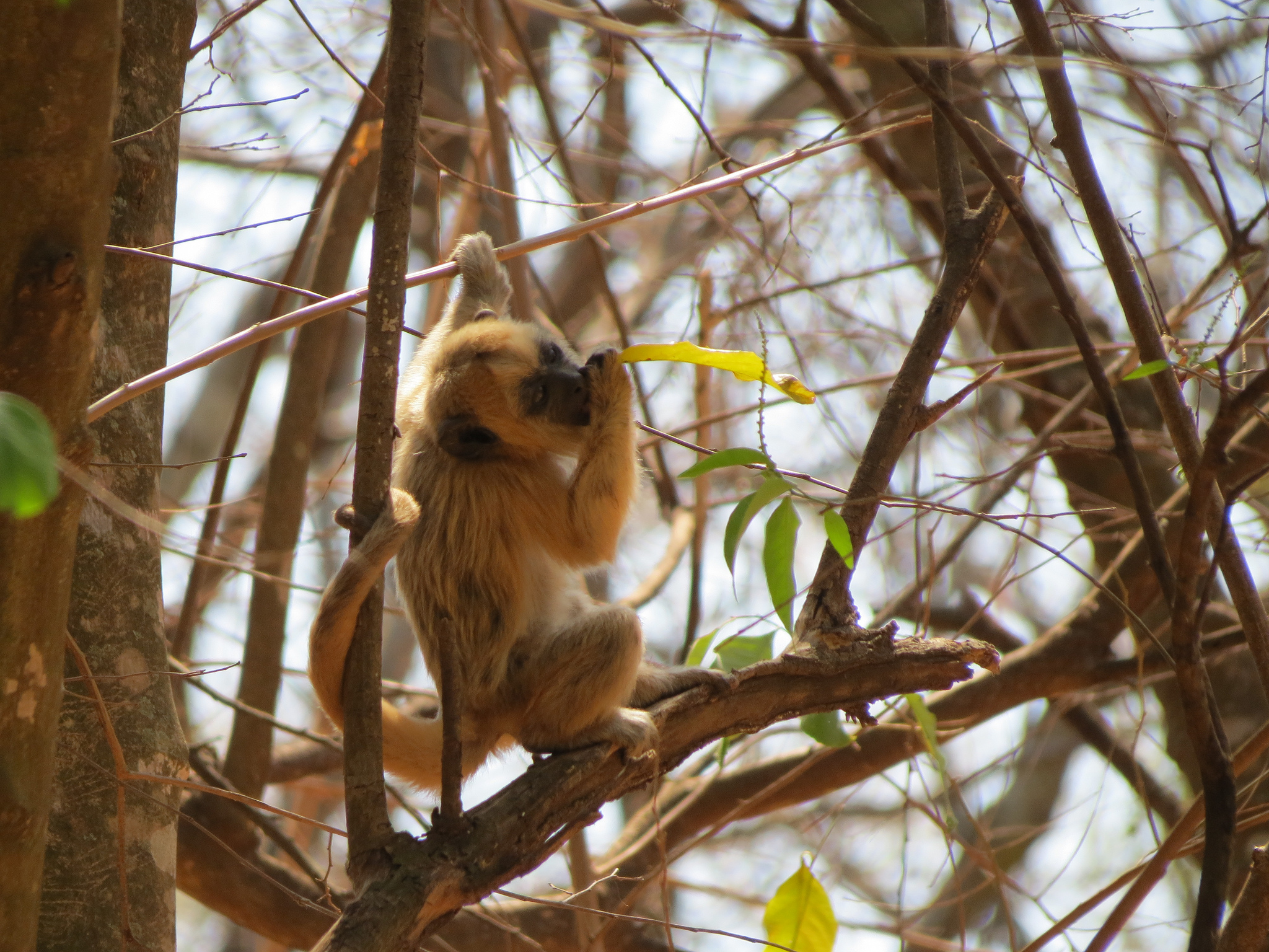 Filhote de bugio-preto em Ilha Solteira, Brasil.